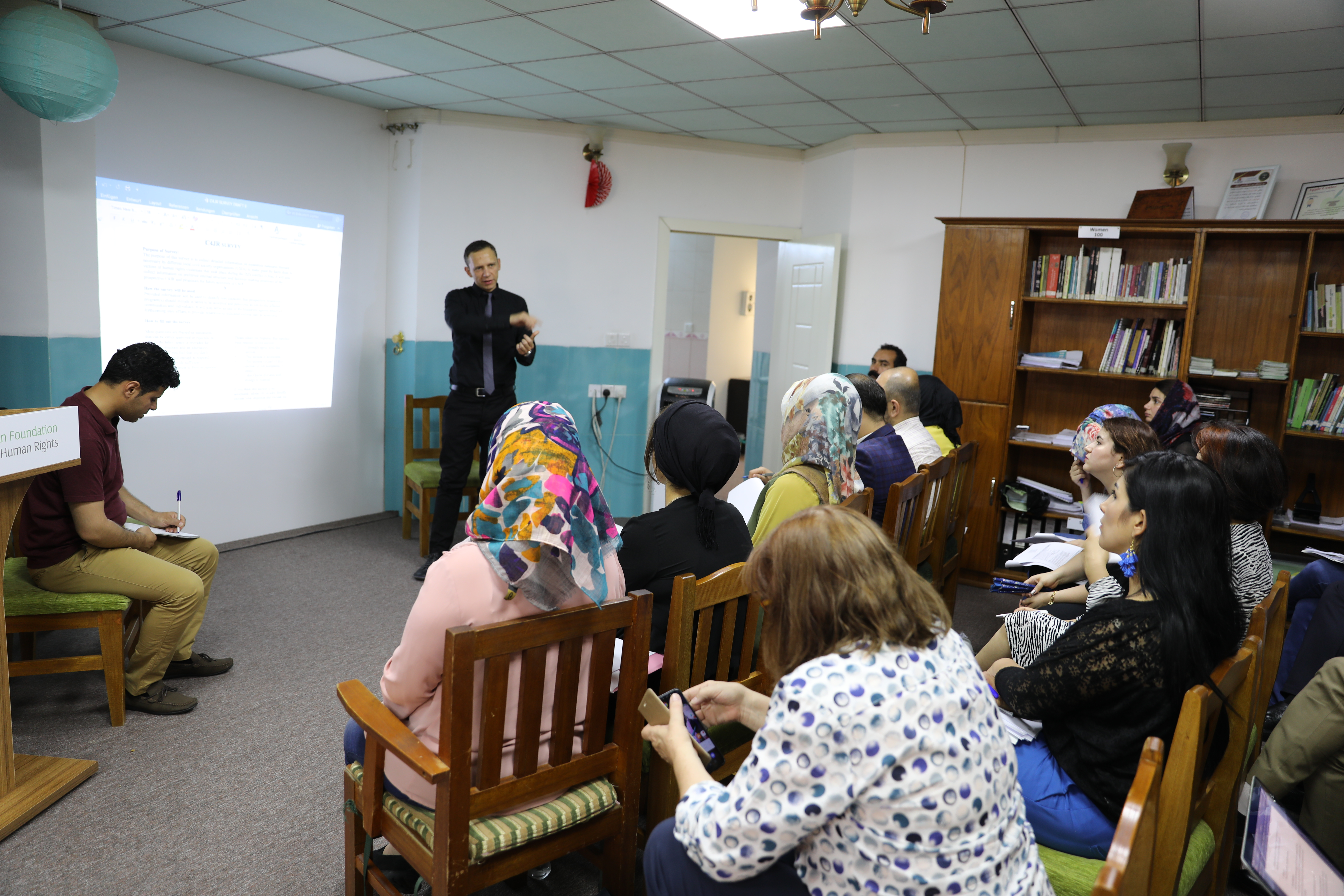 کوردی: بۆیان گاڤرلۆڤج سیمینارێک دەربارەی هاوپەیمانی بۆ قەرەبووکردنەوەی دادپەروەرانە پێشکەش دەکات بۆ ڕێکخراوەکەنی کمەڵگەی مەدەنی عێراقی لە لقی سلێمانیی دەزگای ژیان بۆ ماەکانی مرۆڤ